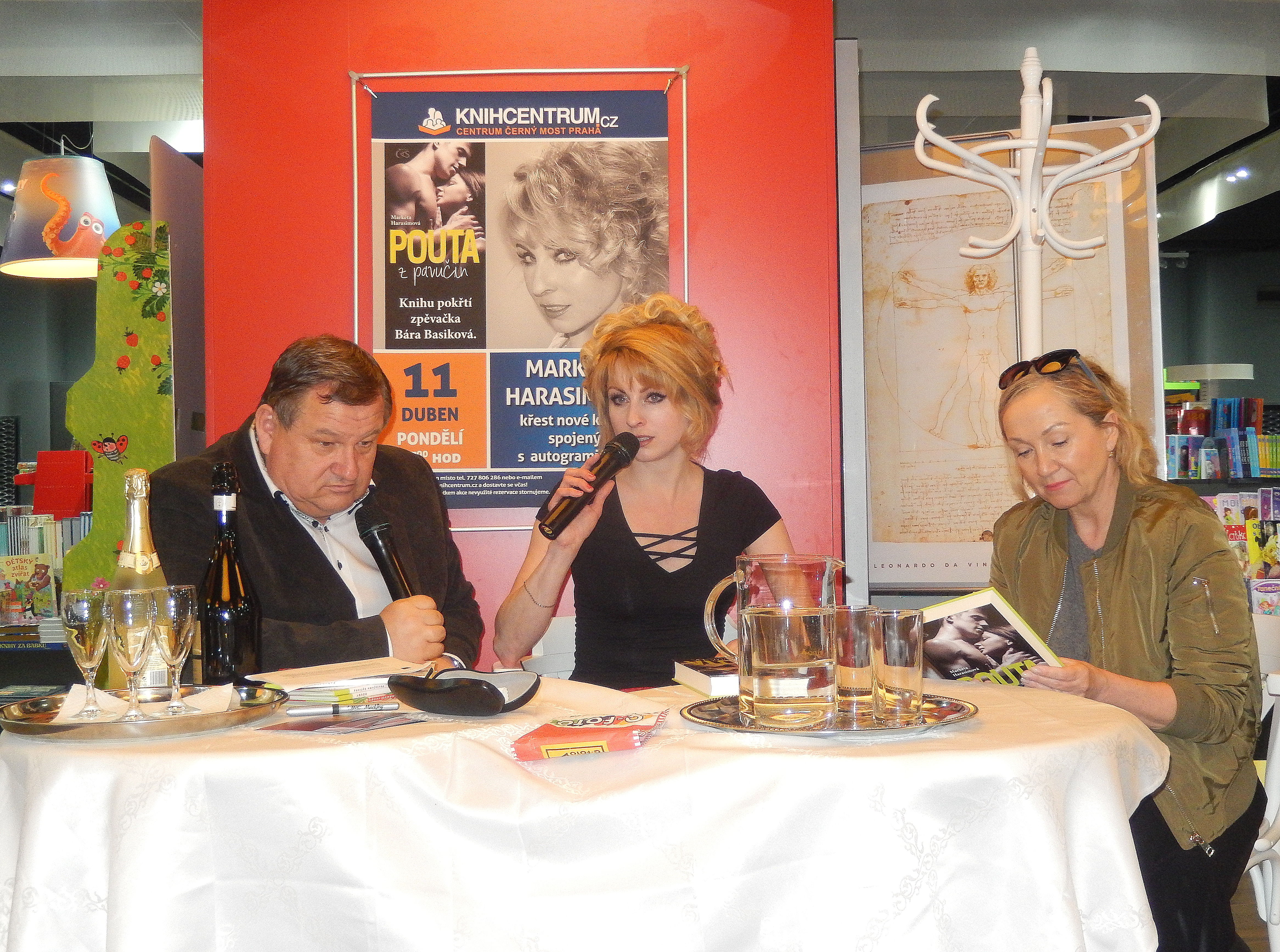 křest knihy